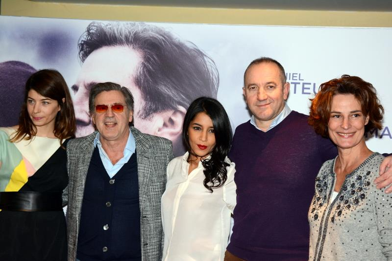 Avant-première du film "Avant l'hiver" : Anne Metzler, Daniel Auteuil, Leïla Bekhti, Philippe Claudel, Laure Killing.